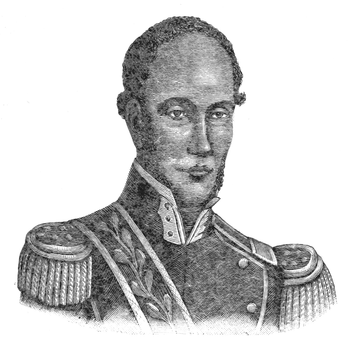 Portrait du président d'Haïti Charles Rivière Hérard